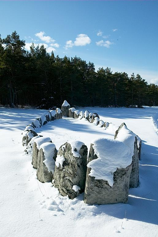 Skeppssättning. Motiv: Djupvik Nyckelord: Vintermotiv Kategori: Stenkrets/domarring/skeppssättning Skeppssättning.